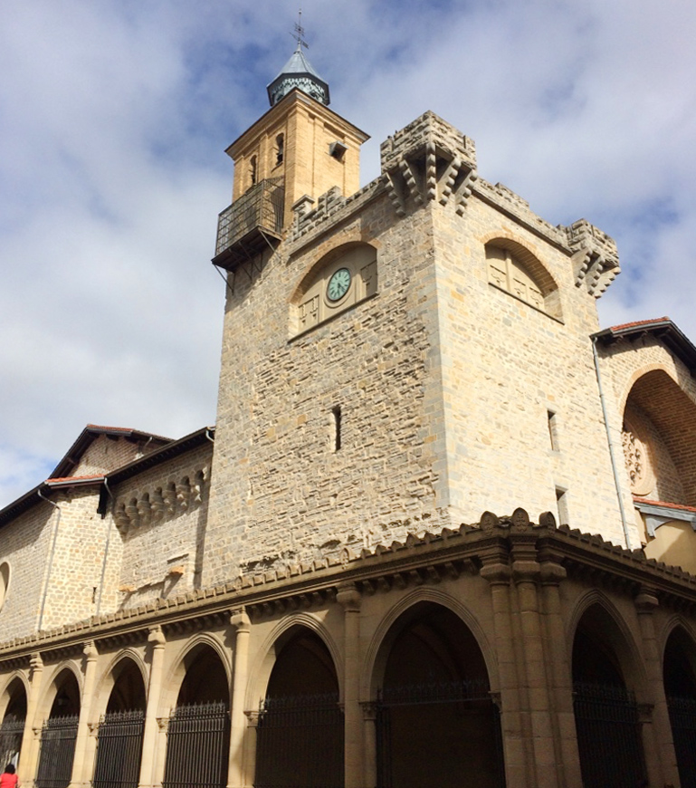 Vista exterior de la iglesia del siglo XII de San Nicolás, con su remate barroco en ladrillo. Pamplona (Navarra)